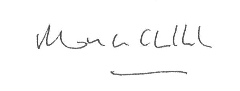 Signature autographe de Mona Chollet, journaliste et essayiste franco-suisse